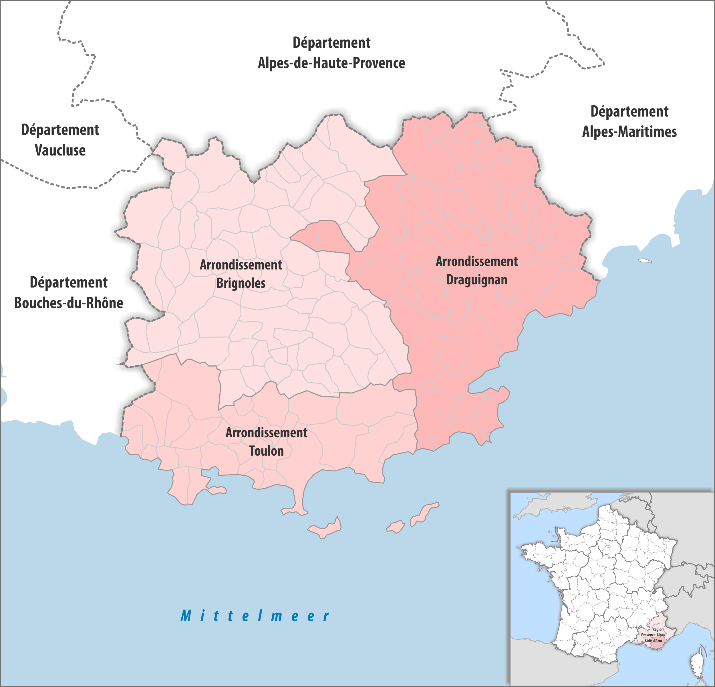 Gemeinden und Arrondissemente im Departement Var